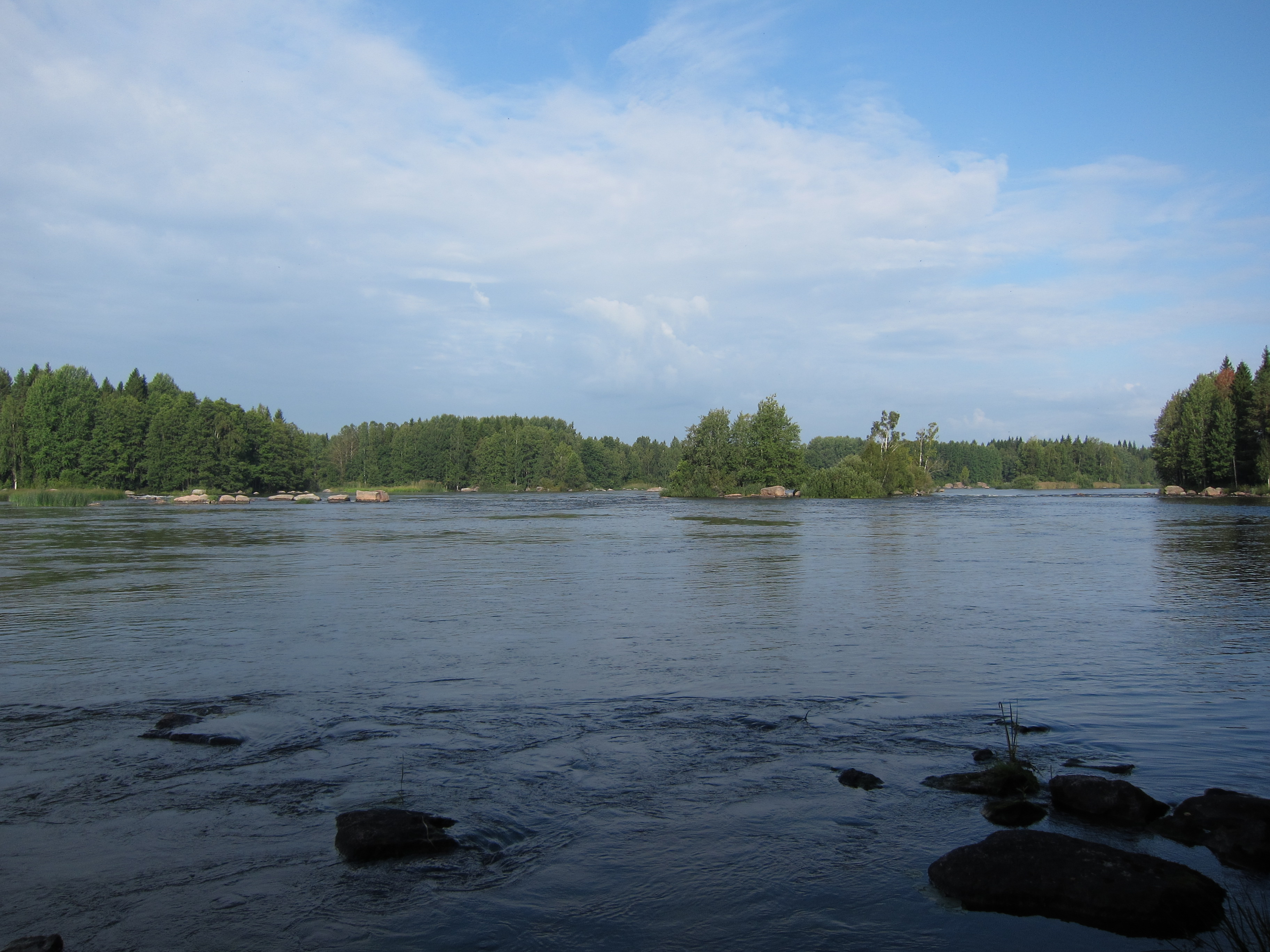 Yleisnäkymä Kultaankoskista Kymijoessa.